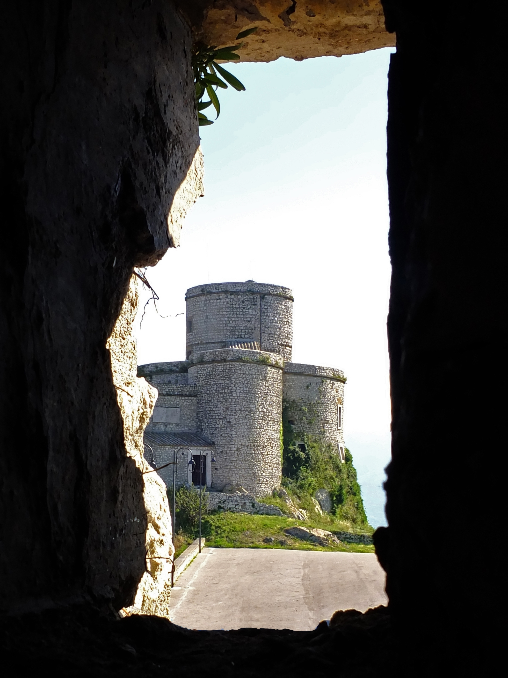 CASTELLO DI MONTESARCHIO (BN) This is a photo of a monument which is part of cultural heritage of Italy.